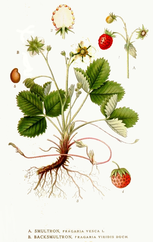 Fragaria vesca L., Fragaria viridis L. Original Description A. Smultron, Fragaria vesca L. B. Backsmultron, Fragaria viridis Duch.